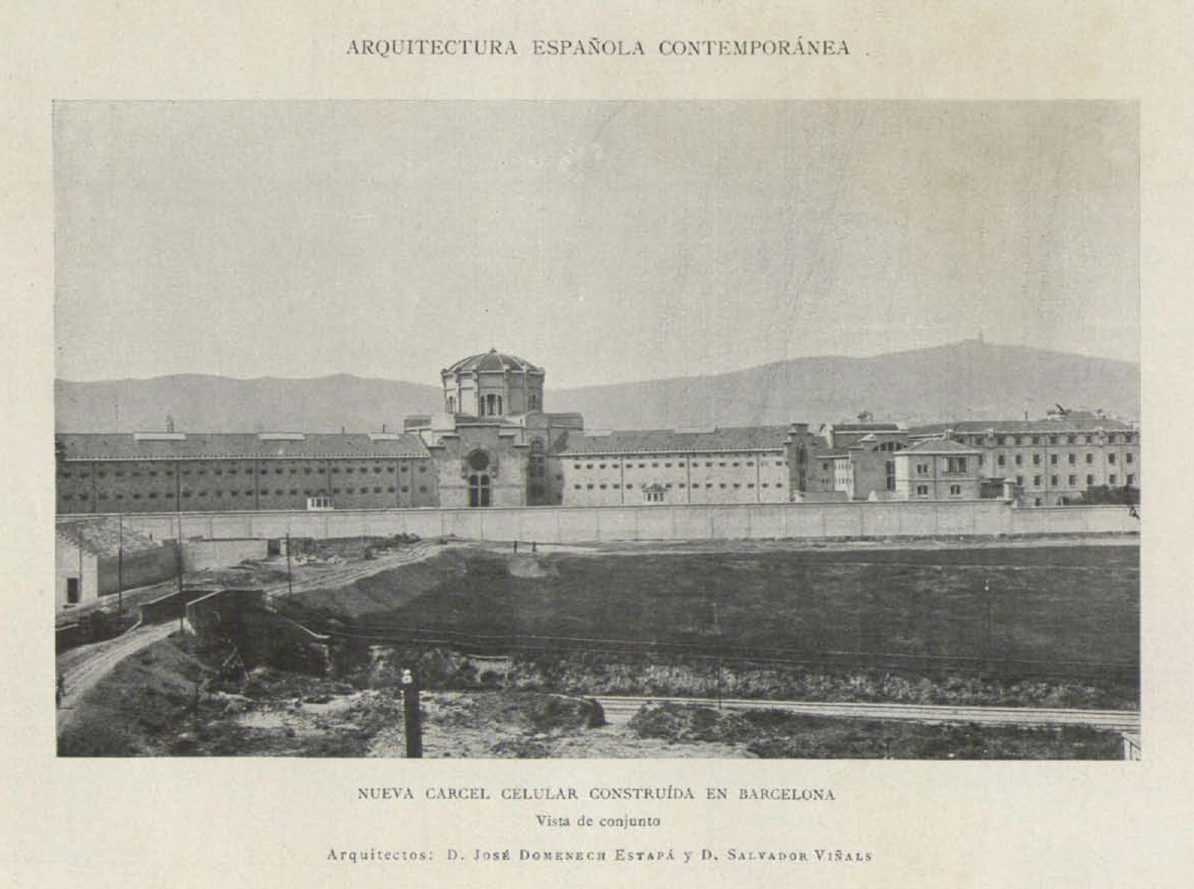 Nueva cárcel celular construida en Barcelona, vista de conjunto.